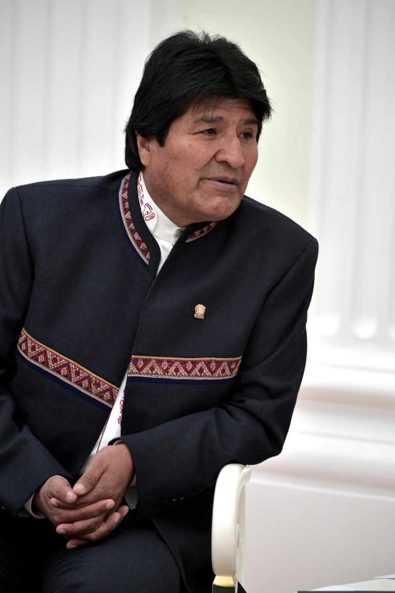 Президентом Многонационального Государства Боливия Эво Моралес во время встречи с Президентом России Владимиром Путиным в Москве